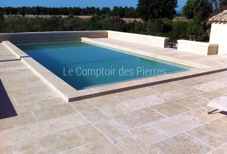 Margelles de piscine et dallage en pierre de Lanvignes Doré-Jaune - Finition Bouchardé Brossé